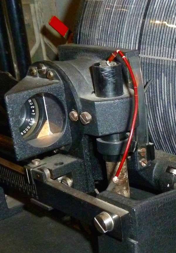 Das Bild zeigt die "Eiserne Jungfrau" als Teilansicht mit der optischen Abtasteinheit.